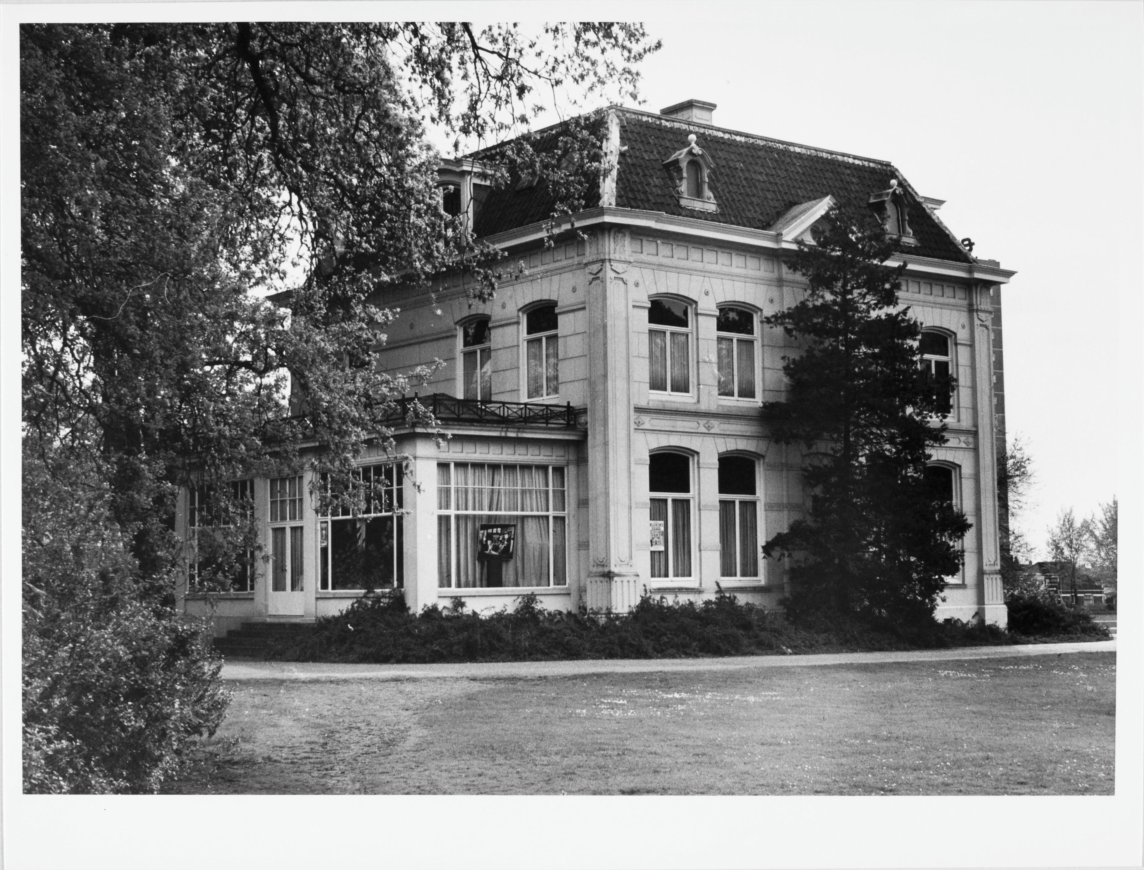 Voormalig Villa Blijdenstein: Overzicht van de voor- en zijgevel (opmerking: Afdrukken verkregen via Ypie Attema, oud medewerkster van de Rijksdienst voor de Monumentenzorg.)